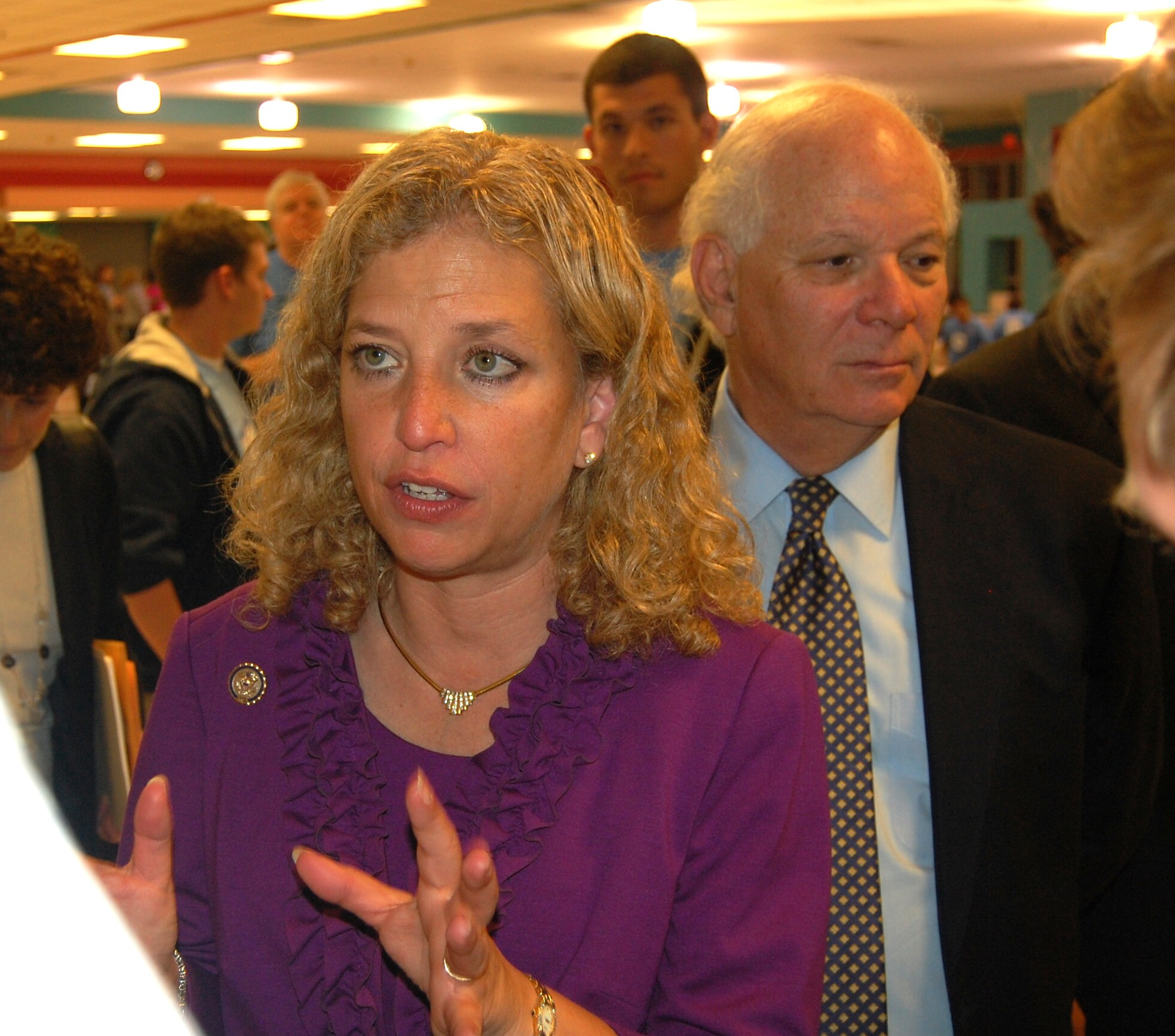 20111027_988 Chair Wasserman-Shultz & Sen Cardin